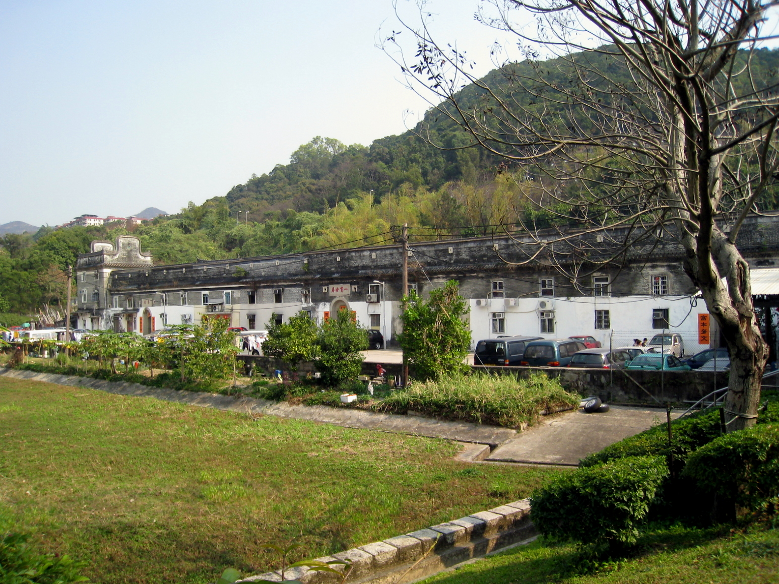 HK Tsang Tai Uk In Sha Tin